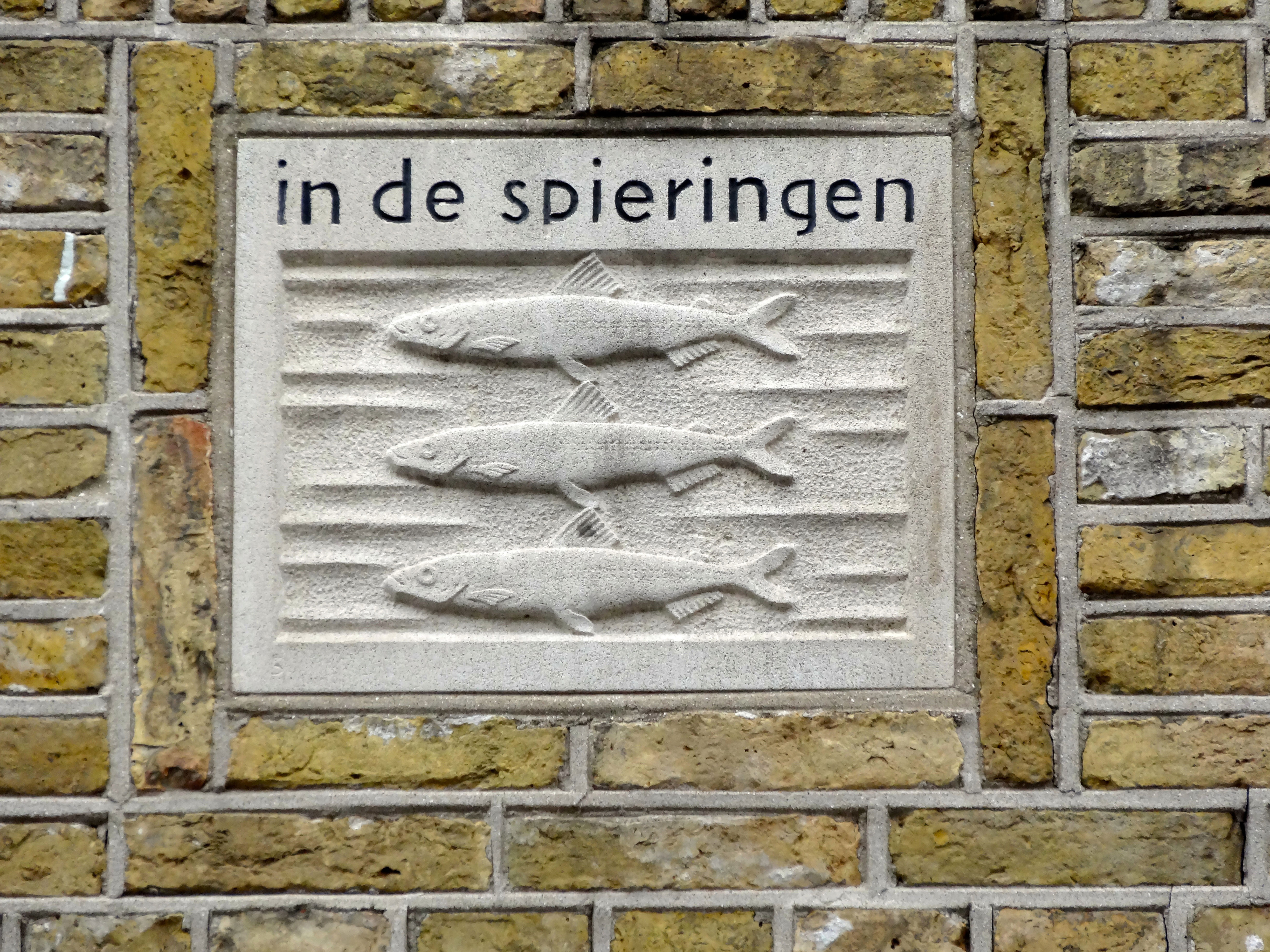 Gevelsteen gemaakt door Cees Broehs met 'drie spieringen Spieringstraat 6 Gouda, rijksmonument